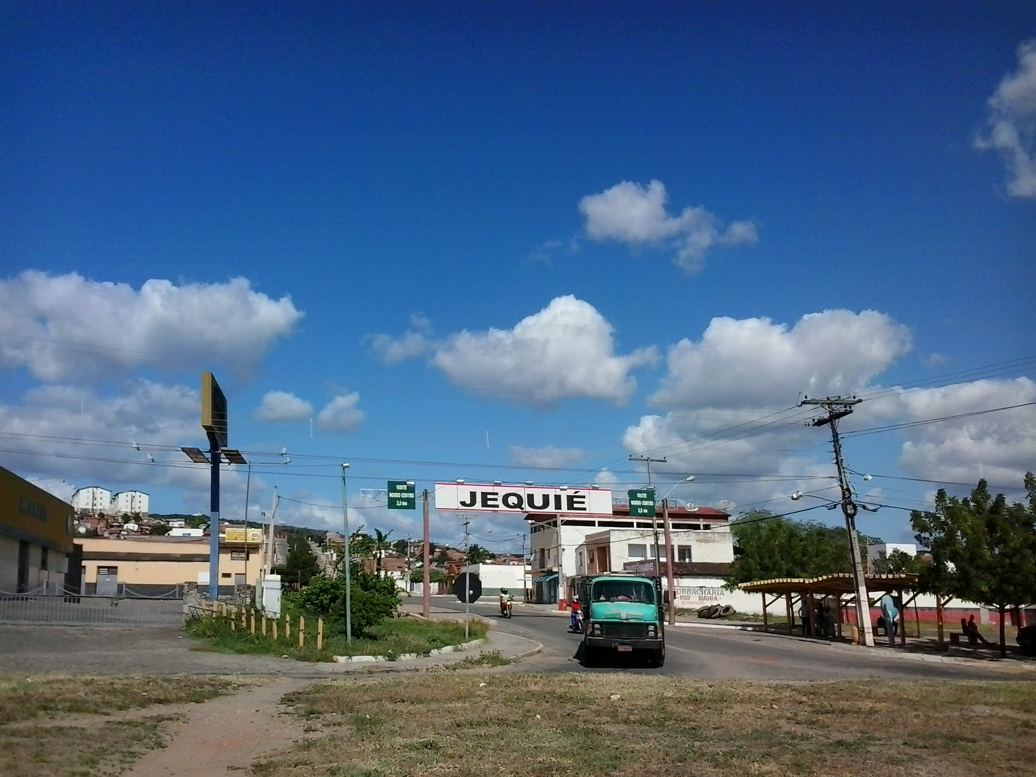 Cidade Nova, Jequié - BA, Brazil